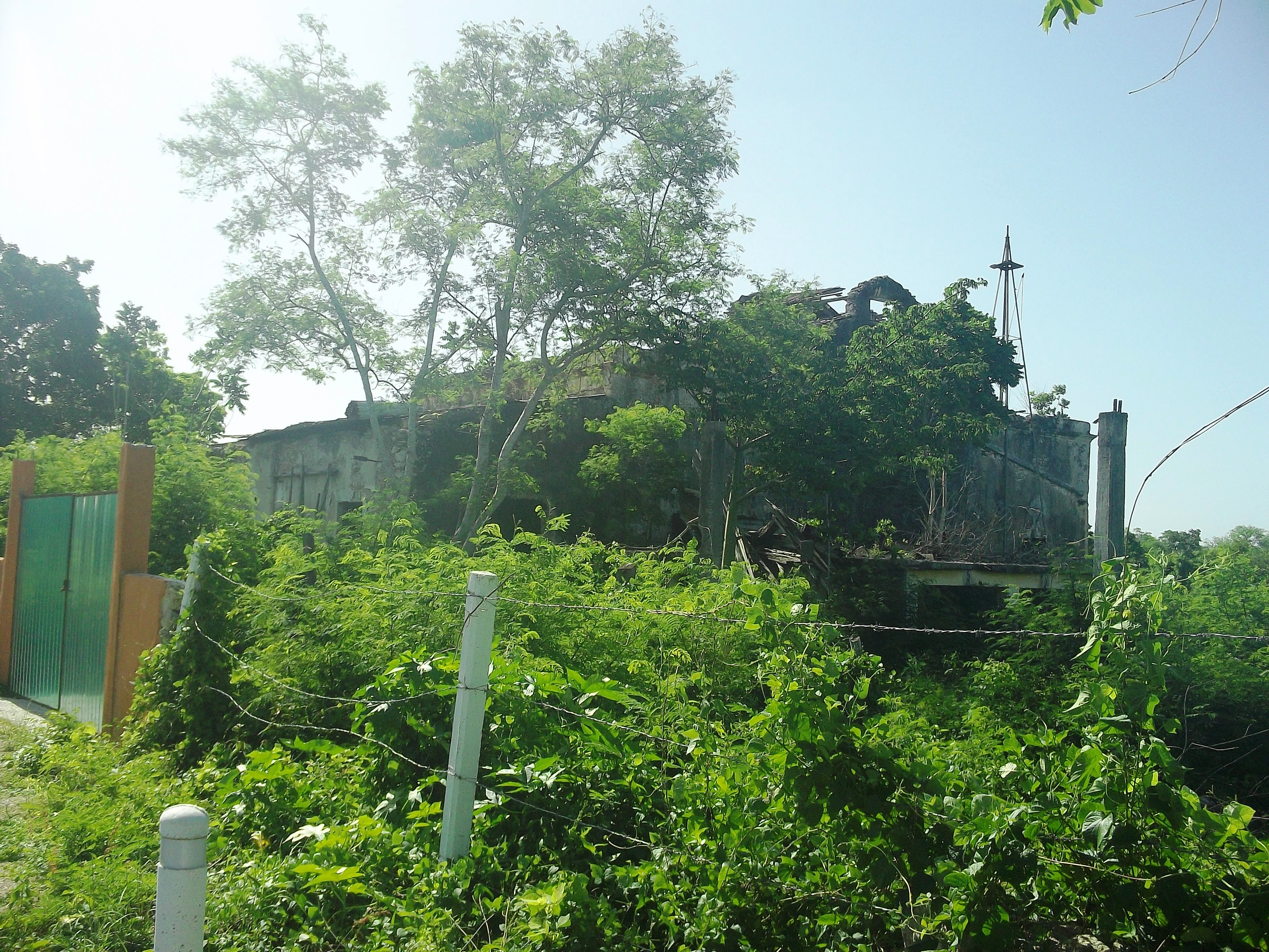 Kuncheilá (Tekal de Venegas), Yucatán.